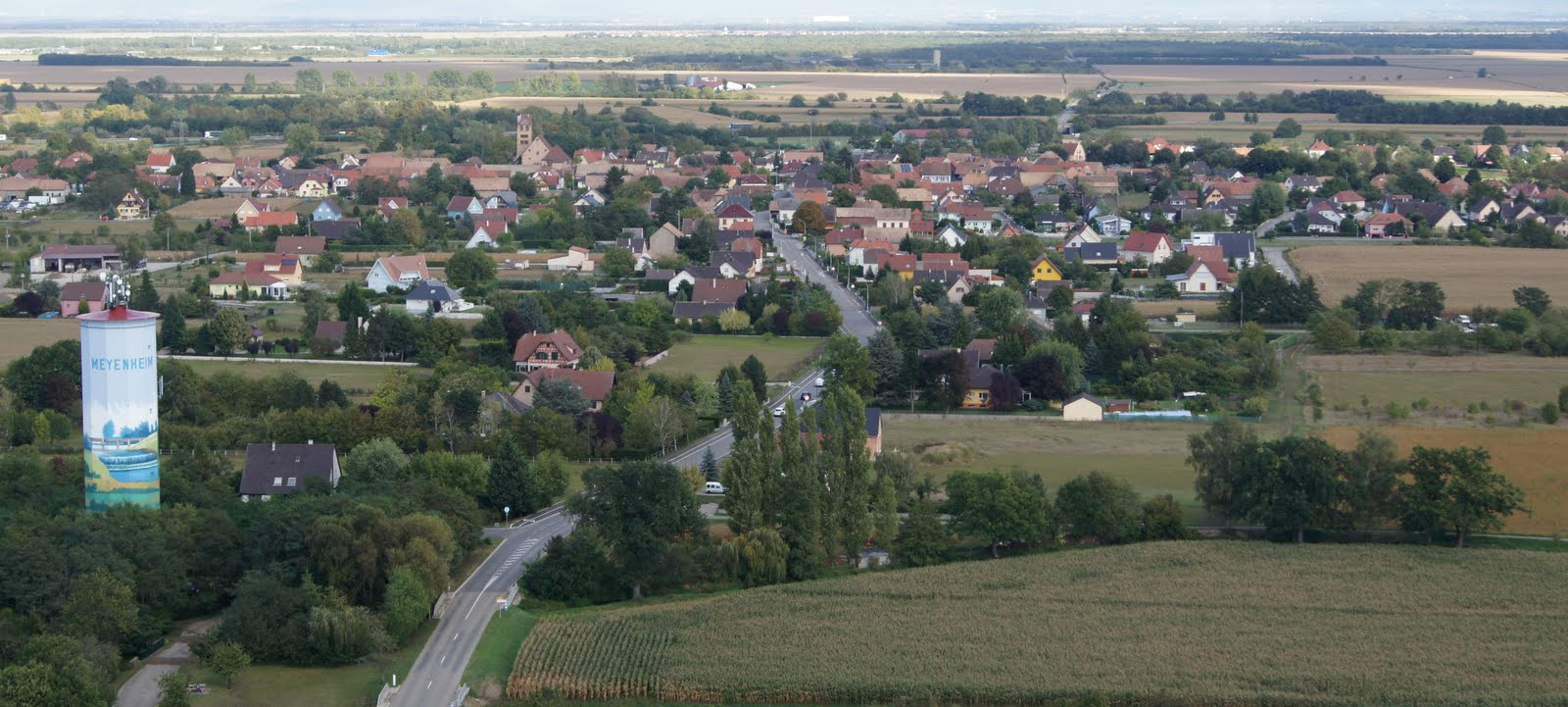 meyenheim